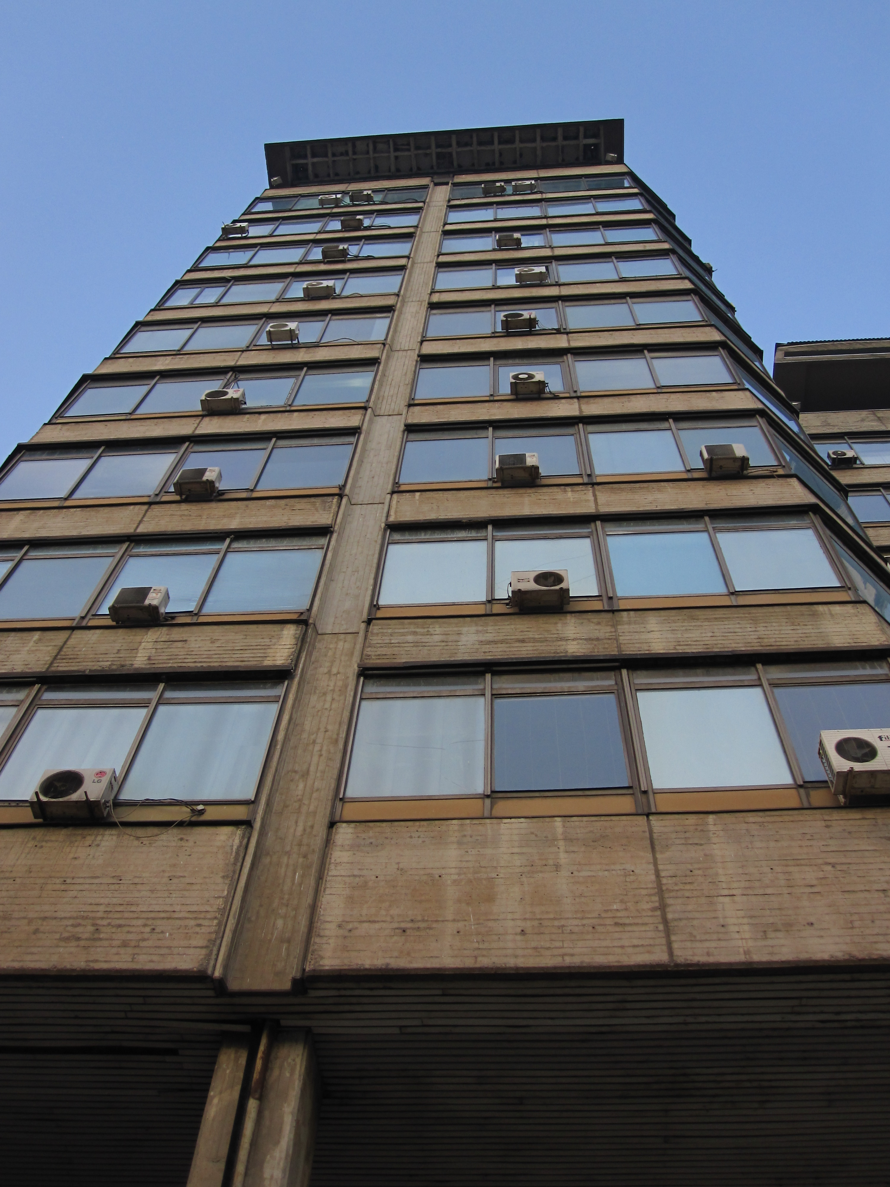 Народна банка на Република Македонија - Скопје